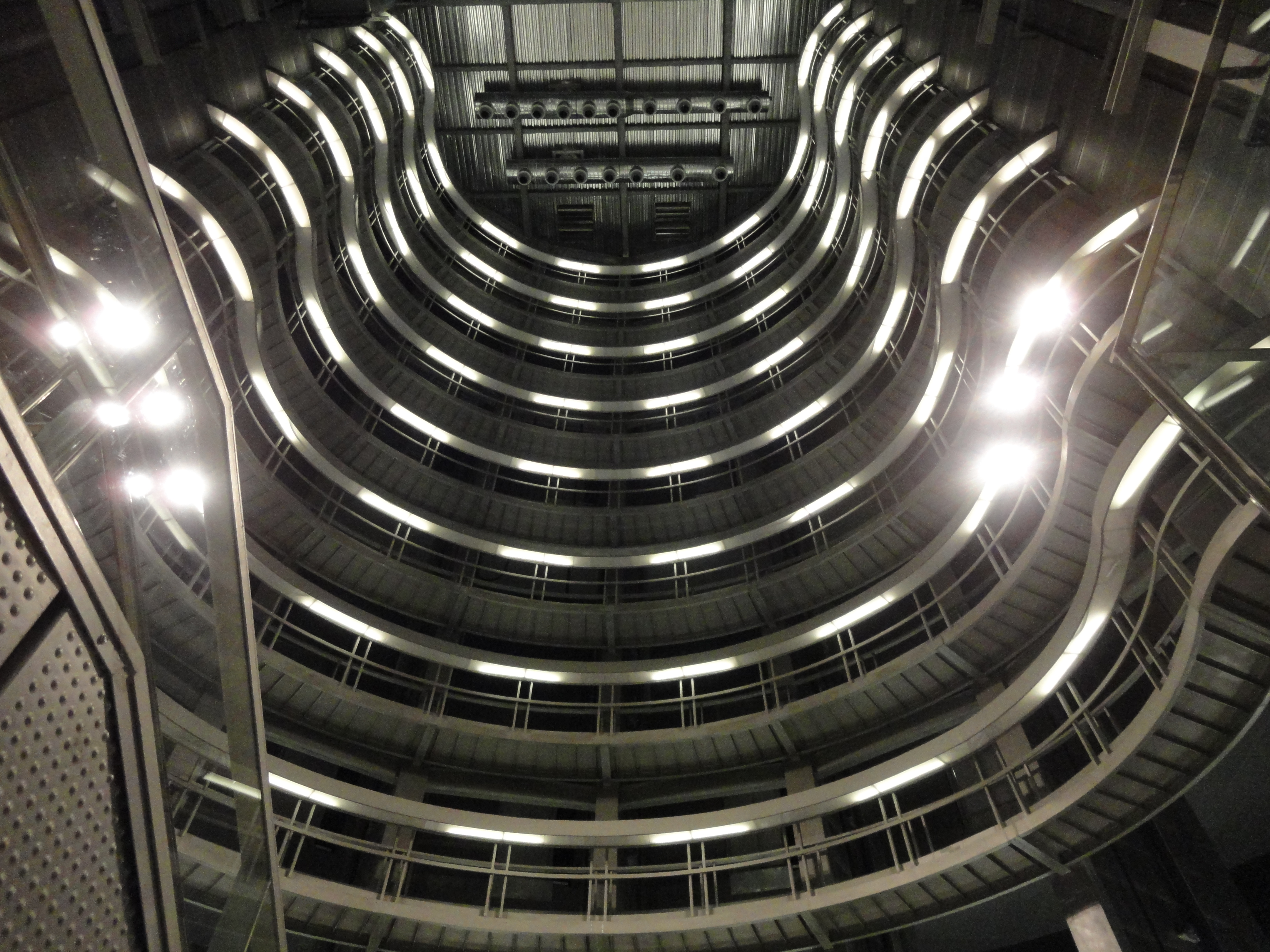 L9 Llefià